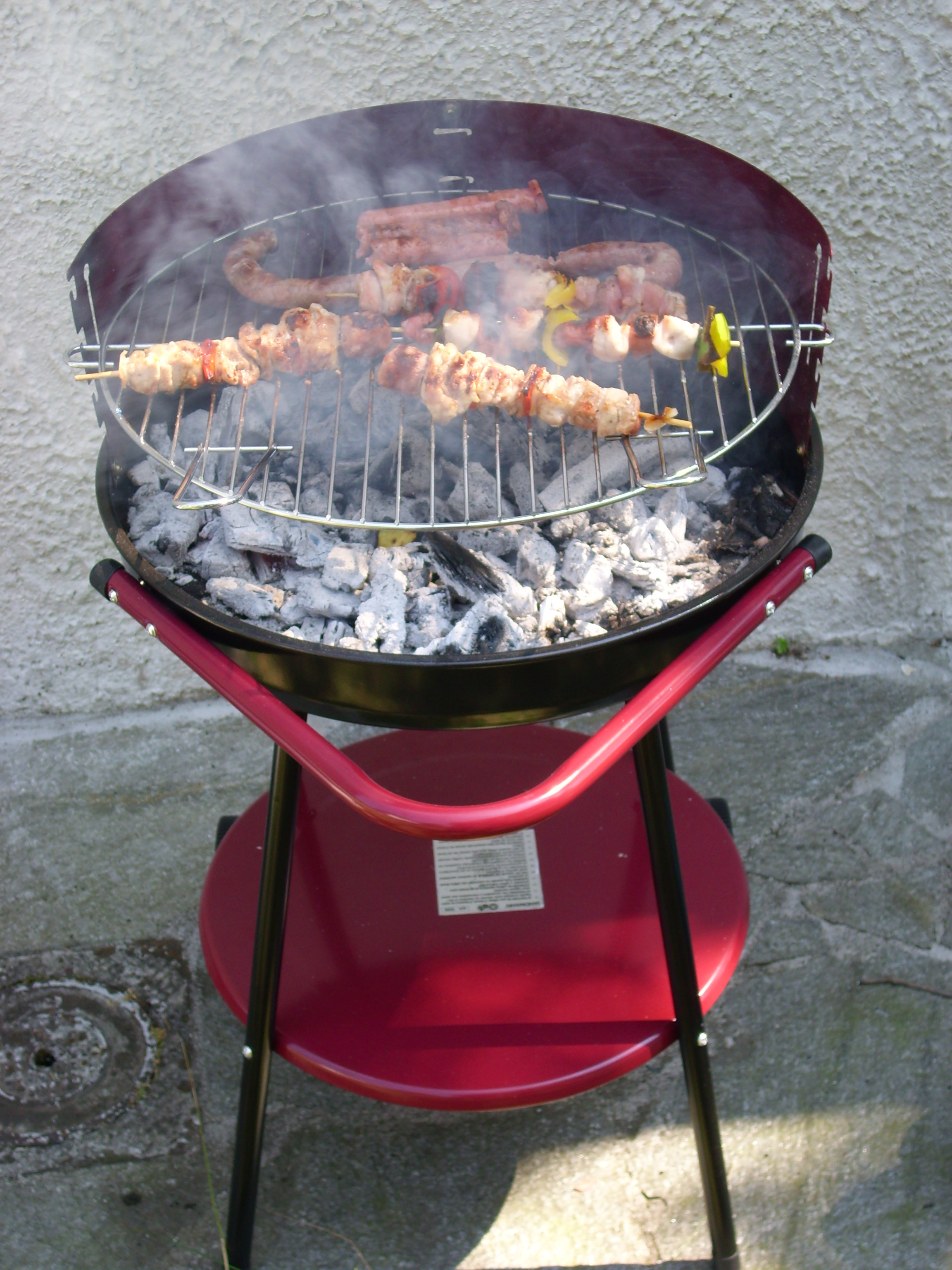 Barbecue con spiedini e salciccia alla griglia